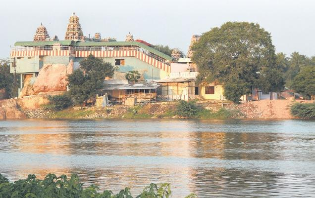 நட்டாற்றீஸ்வரர் கோவில்